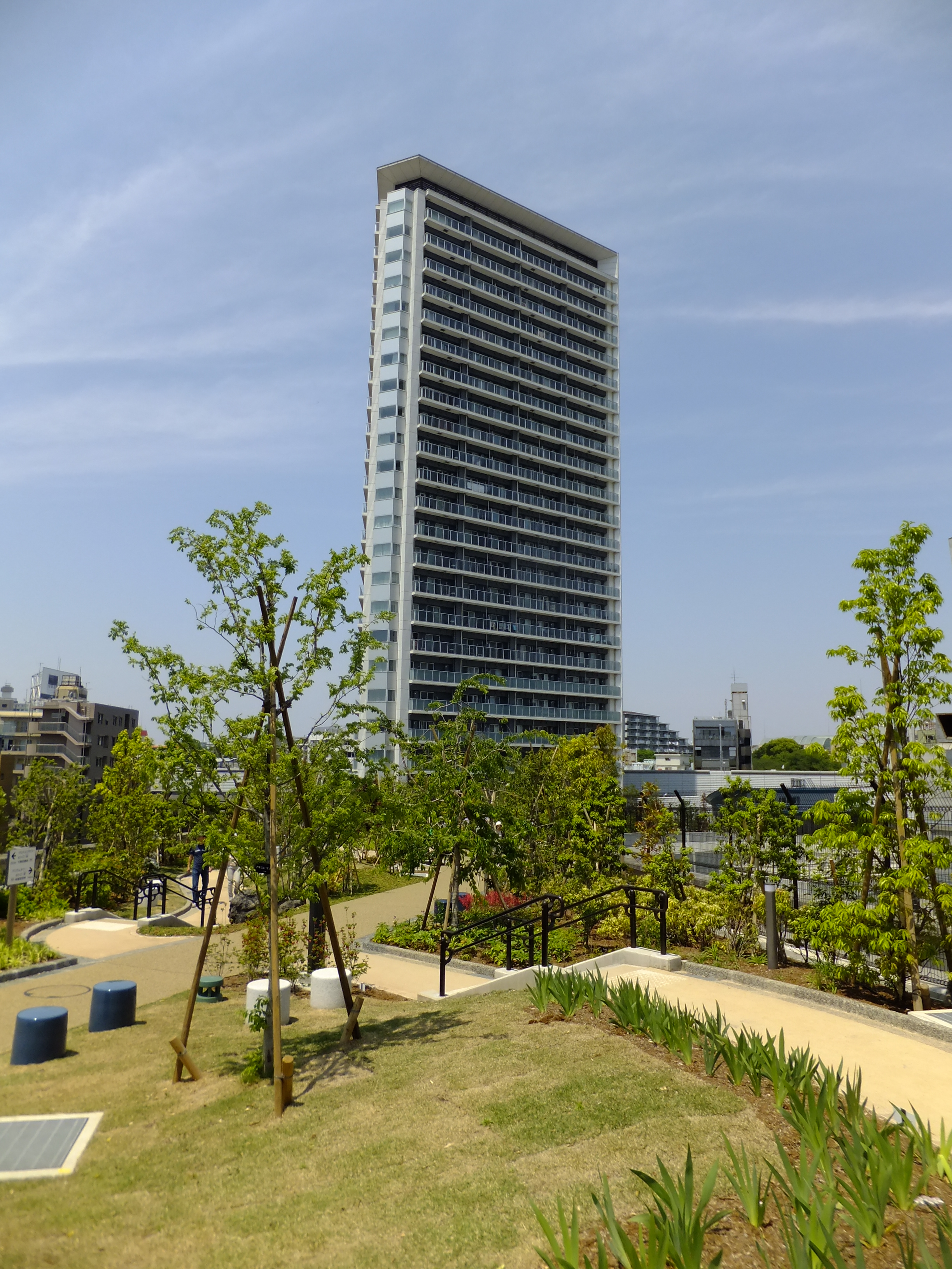 プリズムタワー。大橋ジャンクション建設とともに再開発された区域、「O-Path目黒大橋」のタワーマンションであり、目黒空中庭園と接続している。